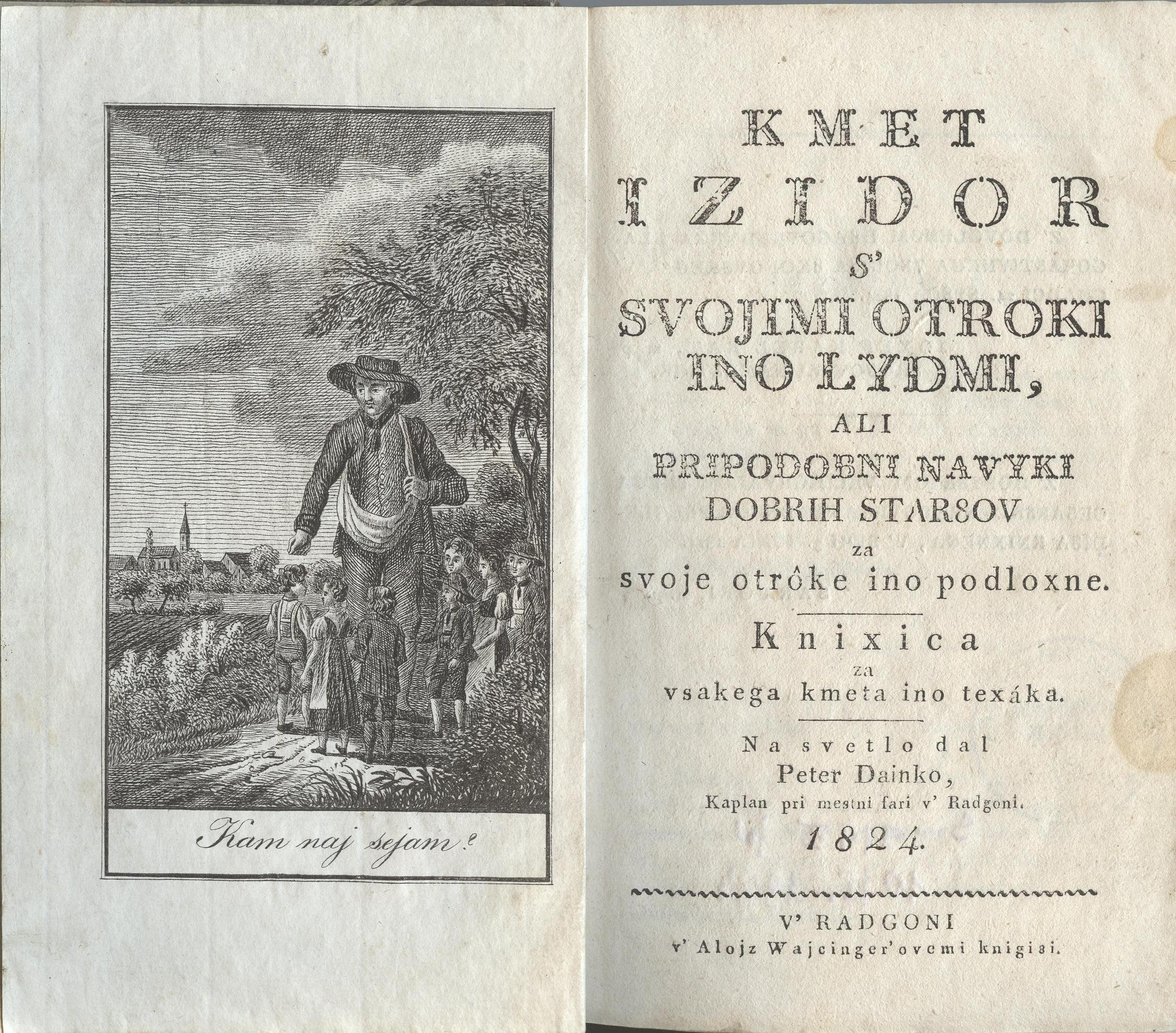 Kmet Izidor s svojimi otroki ino lydmi.